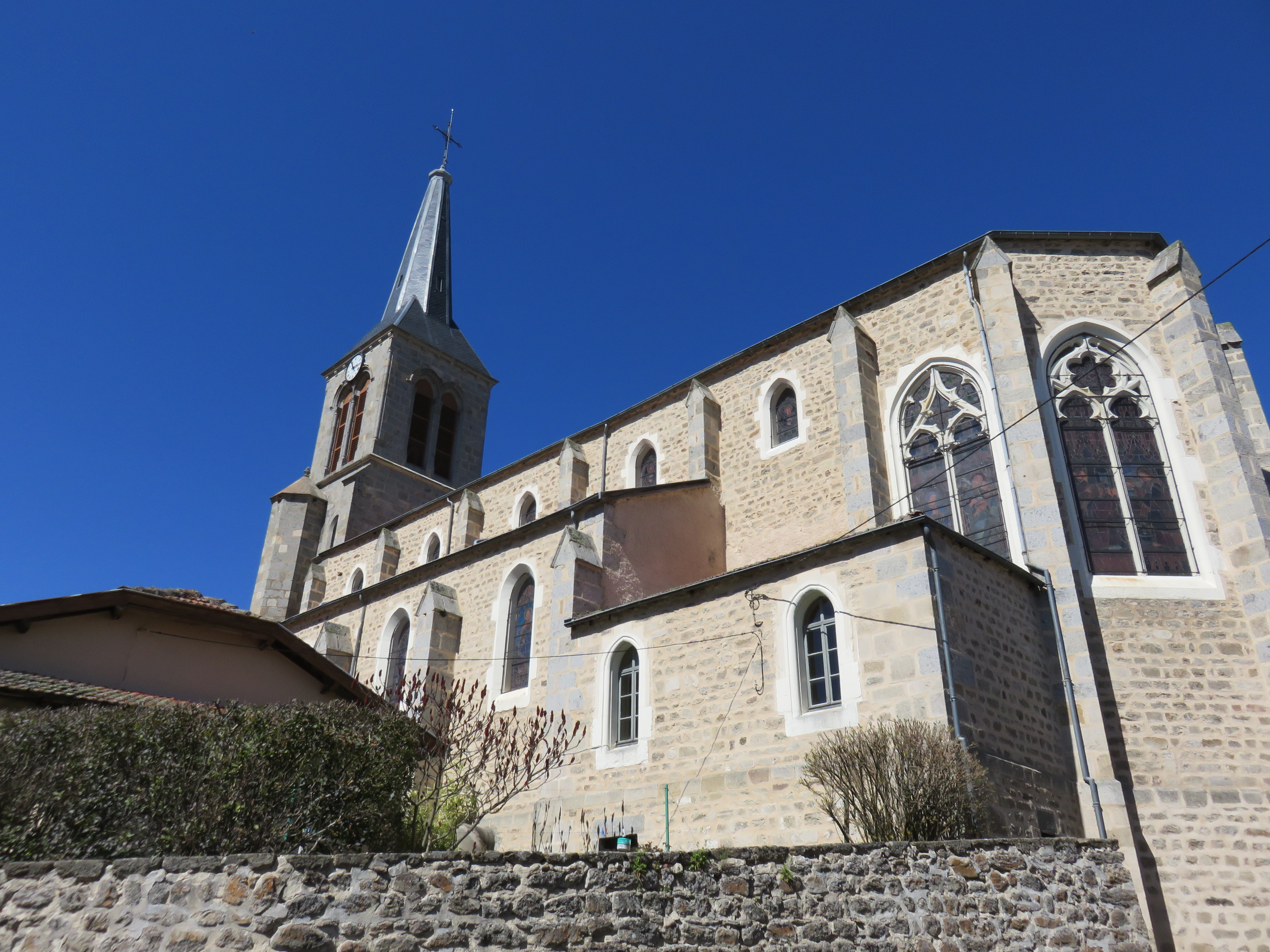 Église Saint-Priest de Sauvessanges (Puy-de-Dôme, France).